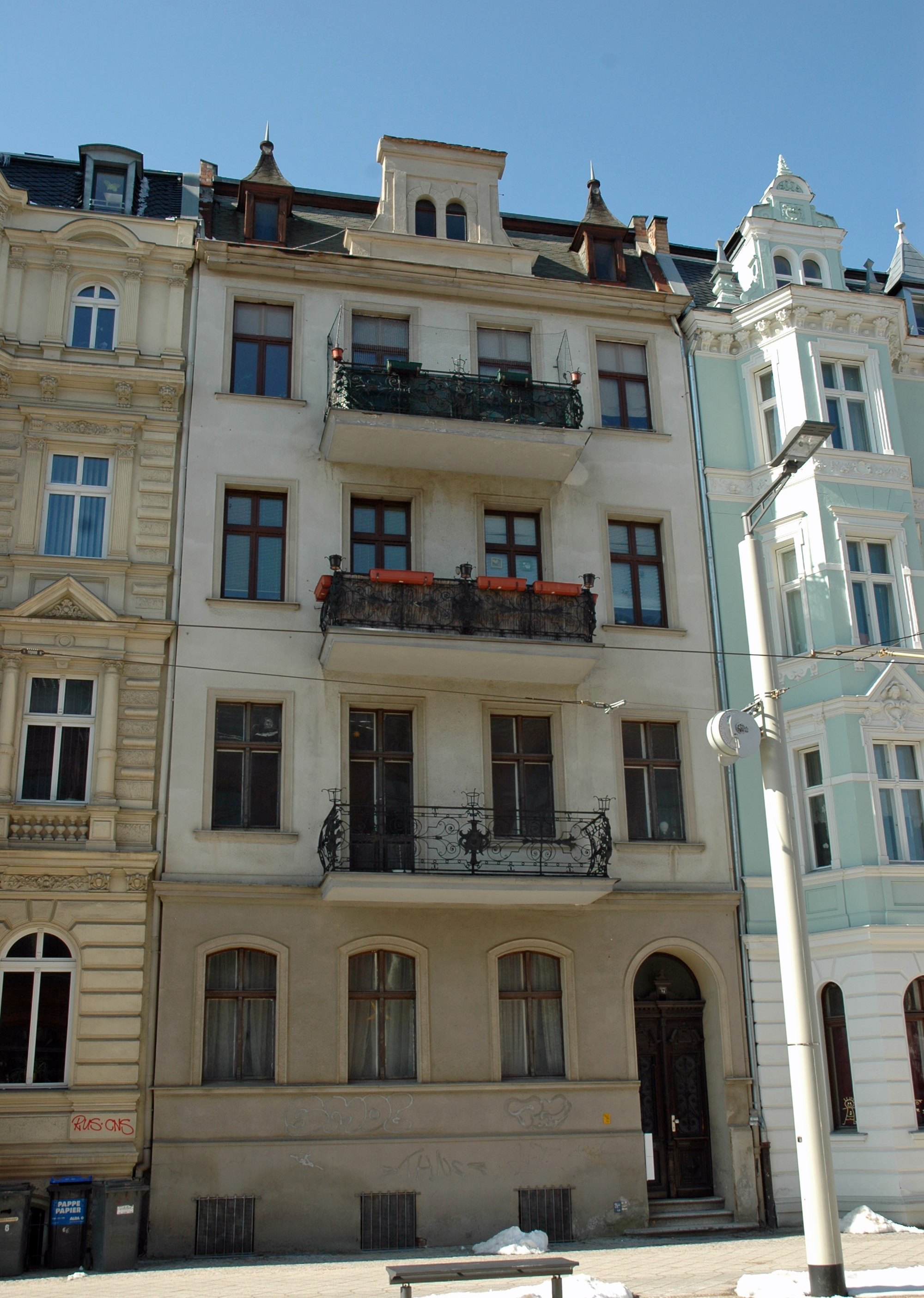 Bahnhofstraße 67